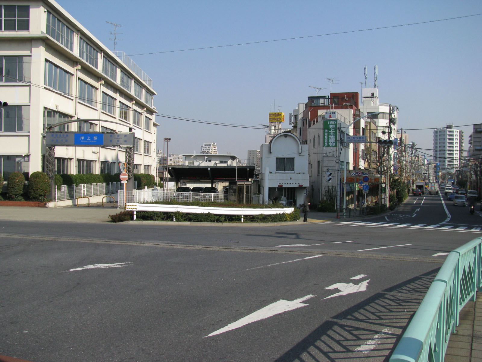 京成・都営・メトロ・東武押上駅